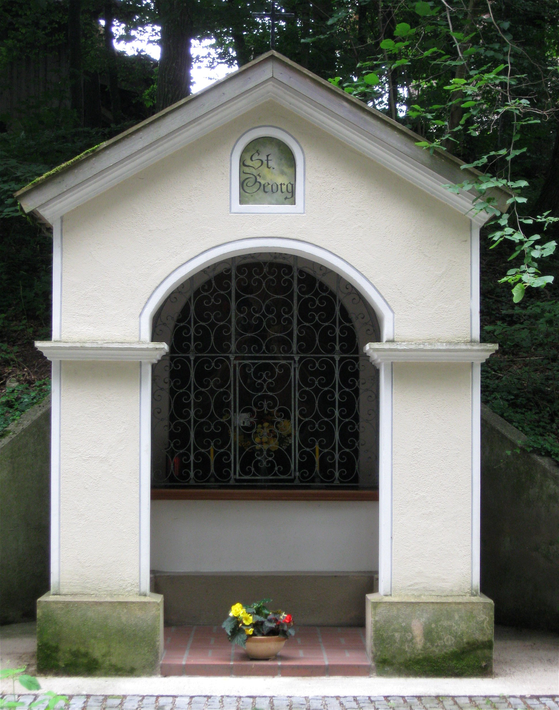 Kreuzpullach: Gleißental, westlich des Ortes; Wegkapelle St. Georg, massive Nischenkapelle mit Portikus, 2. Viertel 19. Jh.